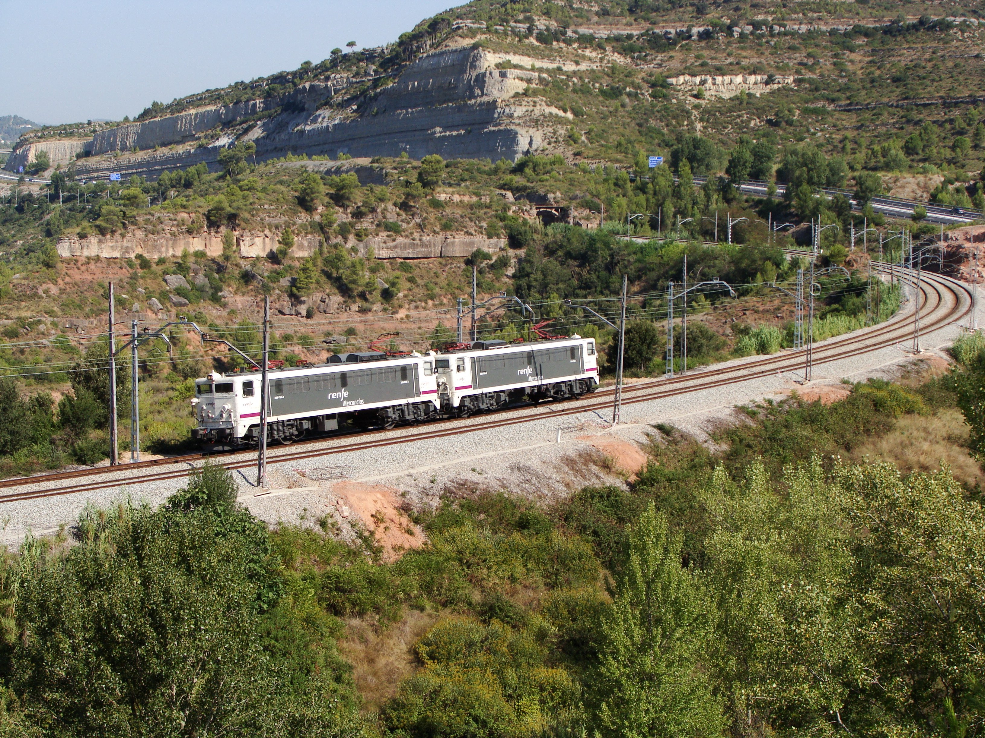 La tàndem 269.356 baixant després de realitzar un trasllat de material al seu pas per Castellbell i el Vilar.